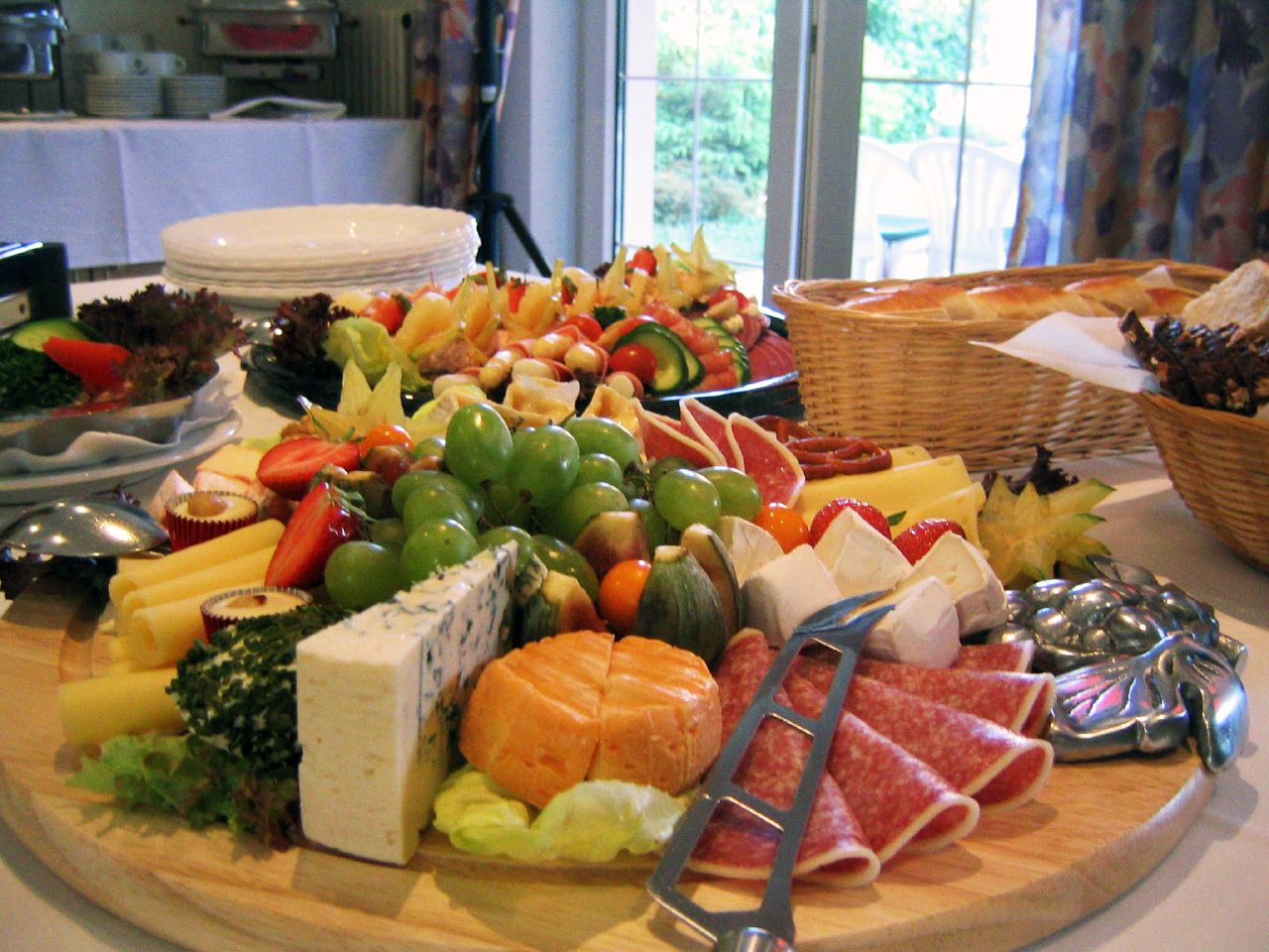 Yummy!